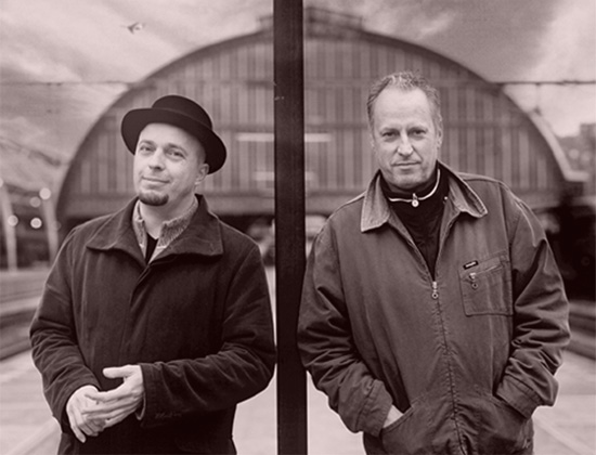 Leon Giesen en Jack Poels ten tijde van hun "Holland America Lijn" tour, foto door Marcel Prins